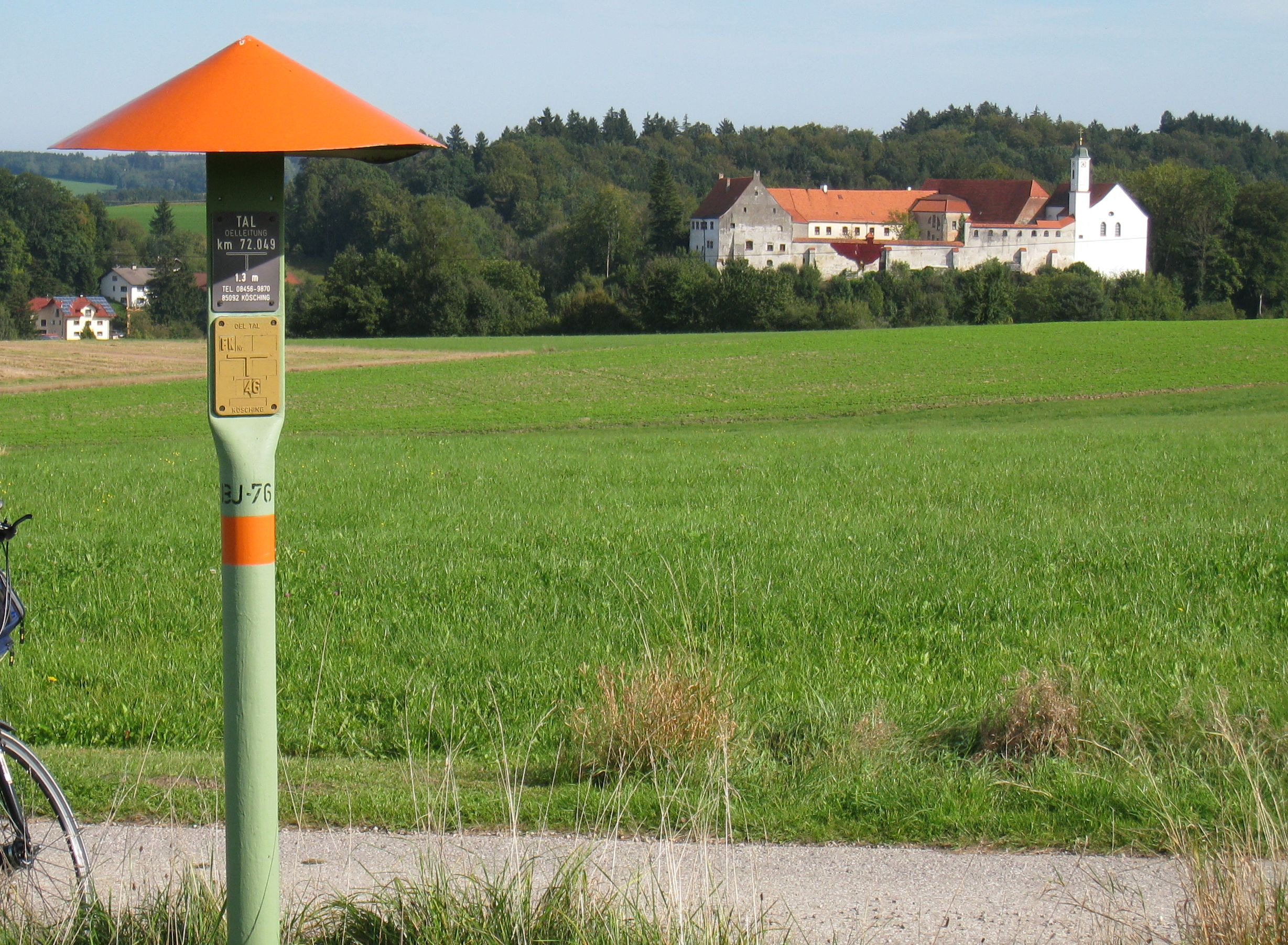 Markierungspfahl der Transalpinen Pipeline TAL Nähe Burgrain, Oberbayern, im Hintergrund das Schloss Burgrain